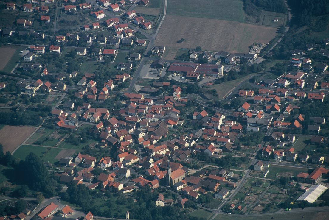 Bastheim/Rhön